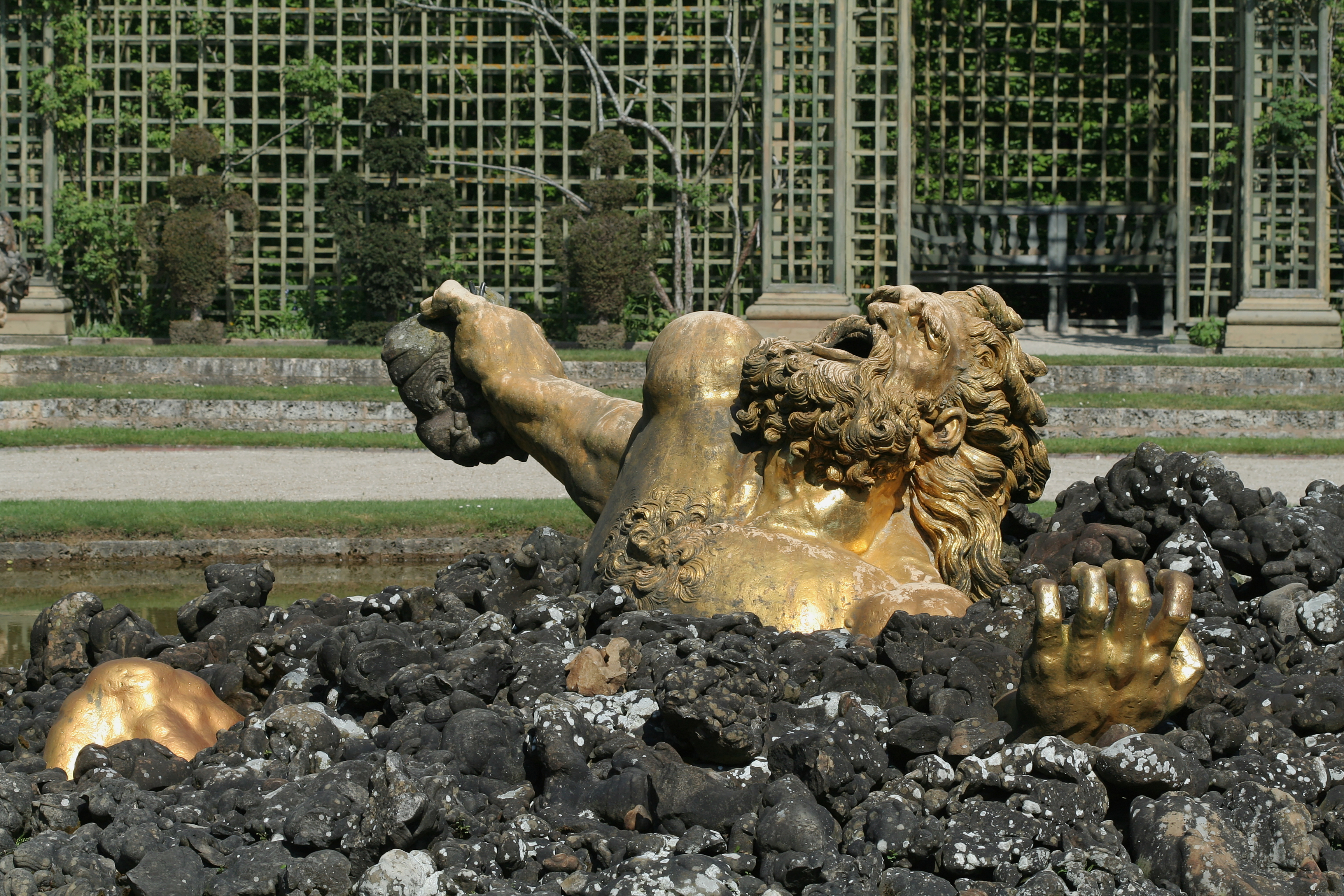 Parc de Versailles, bosquet de l'Encelade. Encelade écrasé sous les rochers et se transformant en l'Etna. plomb doré de Gaspar Marsy.